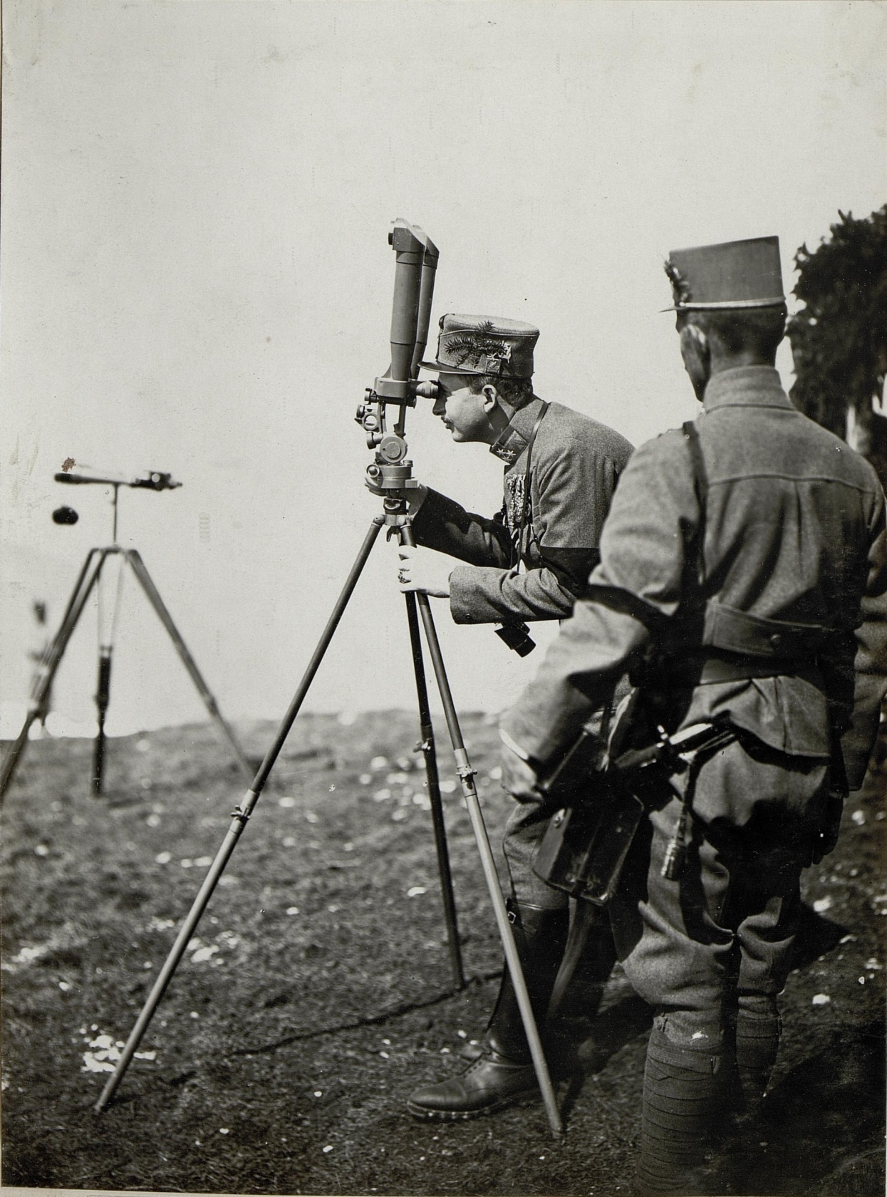 Der Kaiser blickt durch ein Scherenfernrohr. Dolomitenfront, heute Trentino. Fotograf: Schumann, Wien.